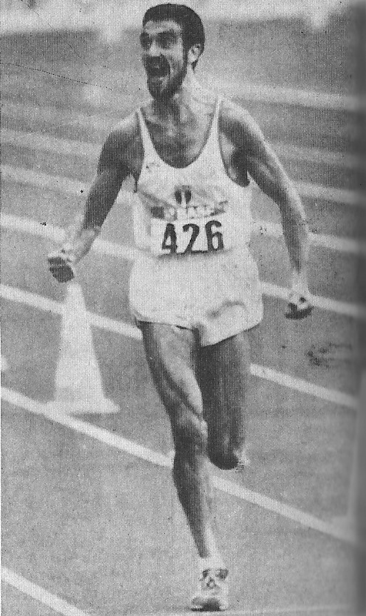 Ritratto dello sportivo Gelindo Bordin durante la vittoria ai campionati europei di Stoccarda del 1986 Categoria:Immagini di sportivi